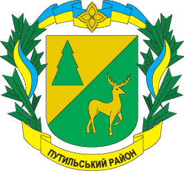 Герб Путильського району